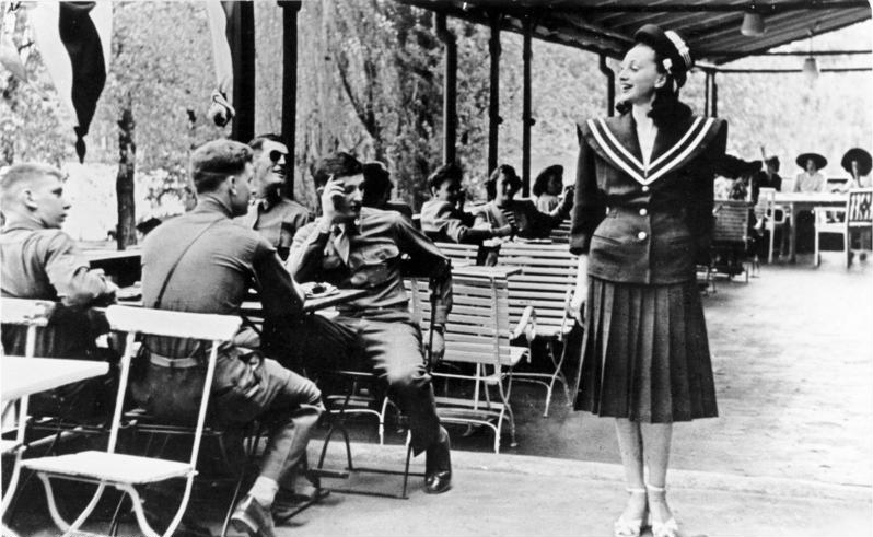 No fraternization! - "Fräuleins" in einem amerikanischen Club